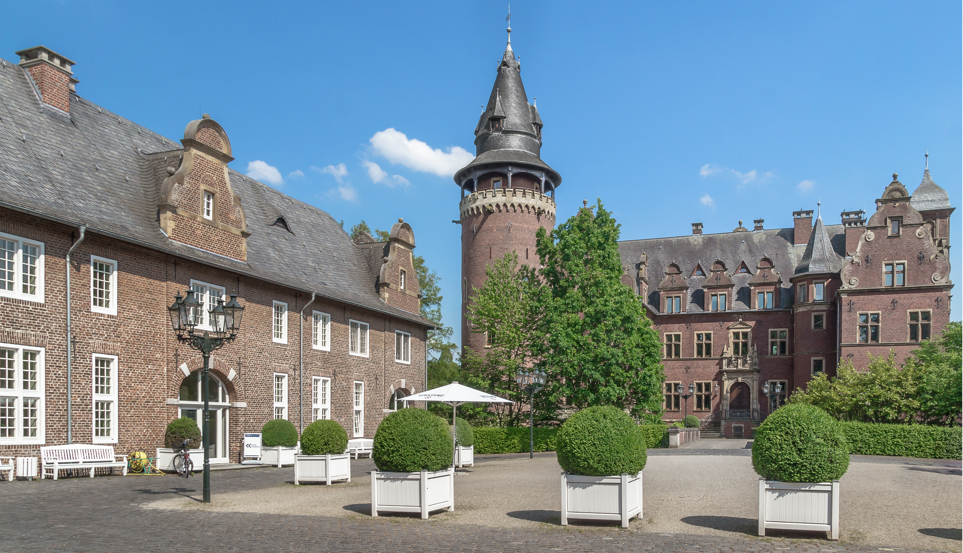 Schloss Krickenbeck This is a photograph of an architectural monument.